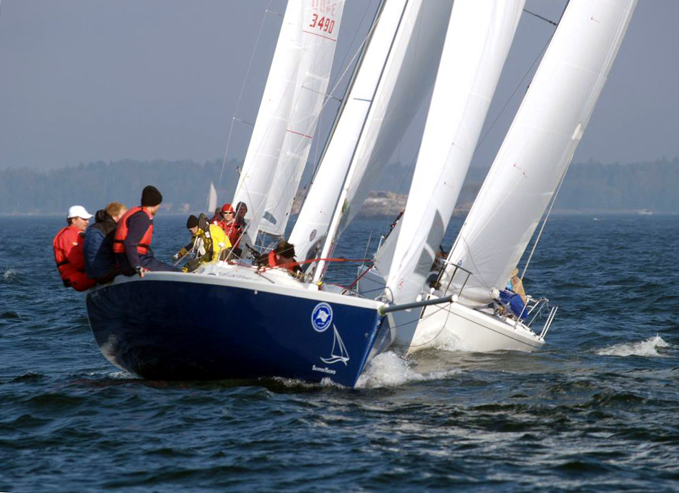 purjehduskilpailu, Suomen Urheiluveneliitton luokkamestaruus 2006, Helsinki